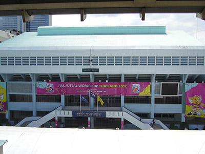 Nimibutr Stadium